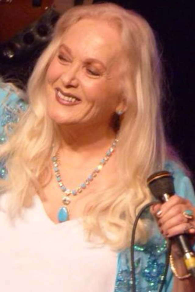 מירי אלוני היא זמרת ישראלית במופע בפסטיבל עין גב 2014 עוד לא אהבתי די - עשור ללכתה של נעמי שמר במעמד כבוד נשיא המדינה - בהנחיית אבשלום קור